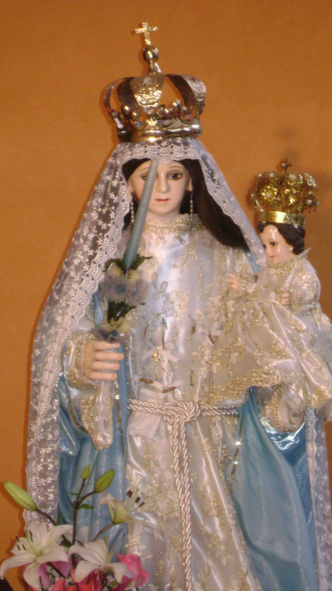 La virgen de la Candelaria venerada en el Pueblo del mismo nombre en Coyoacán